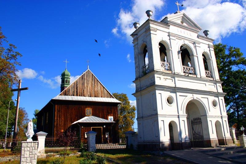 Warszawice Church in Poland